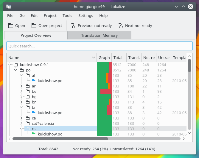 Screenshot des freien Programms Lokalize